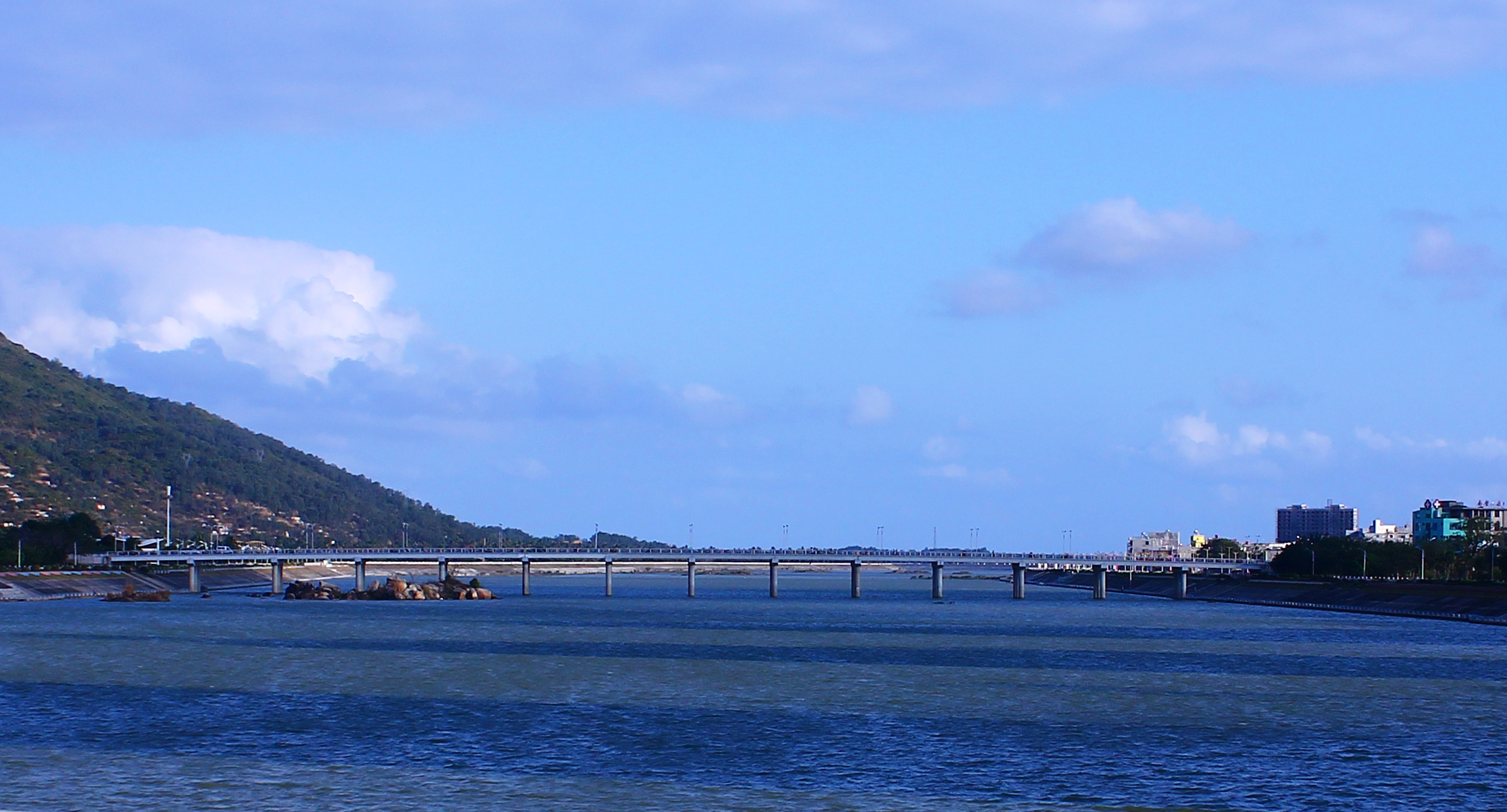 海南省陵水河，拍摄于陵水县椰林大桥，面向东南。